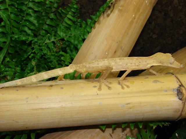 Uroplatus lineatus (a gecko)